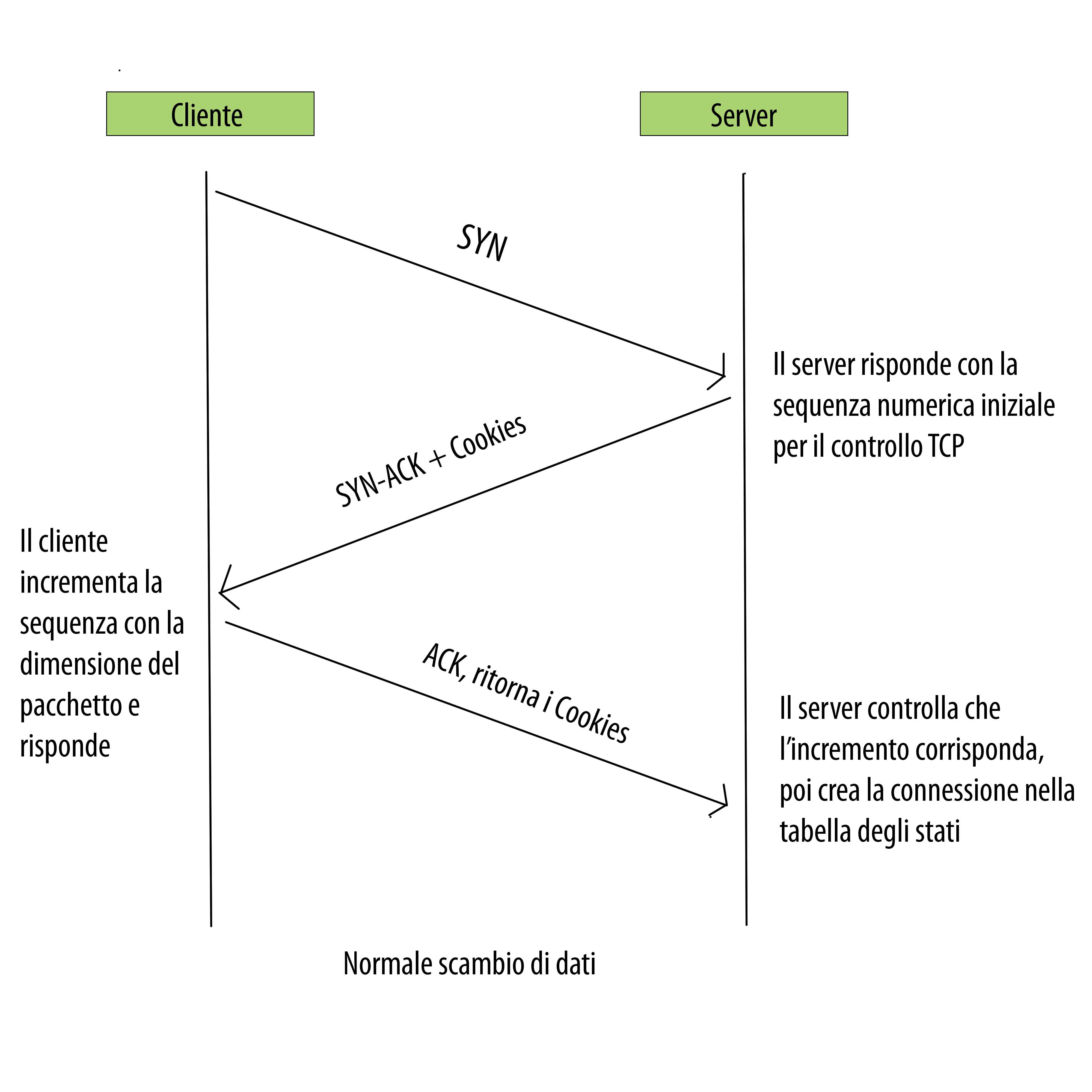 Uso dei SYN acks